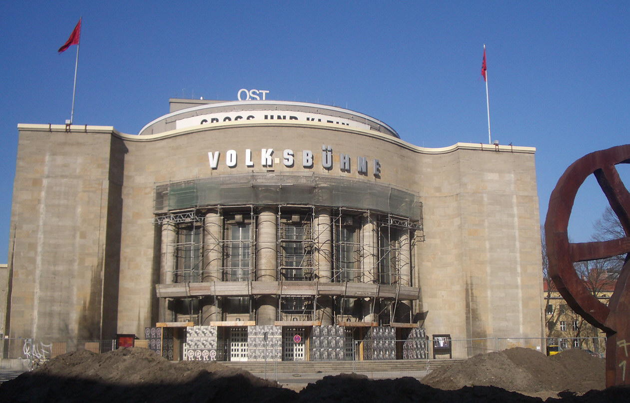 Volksbühne Berlin, Rosa-Luxemburg-Platz, Berlin, Germany